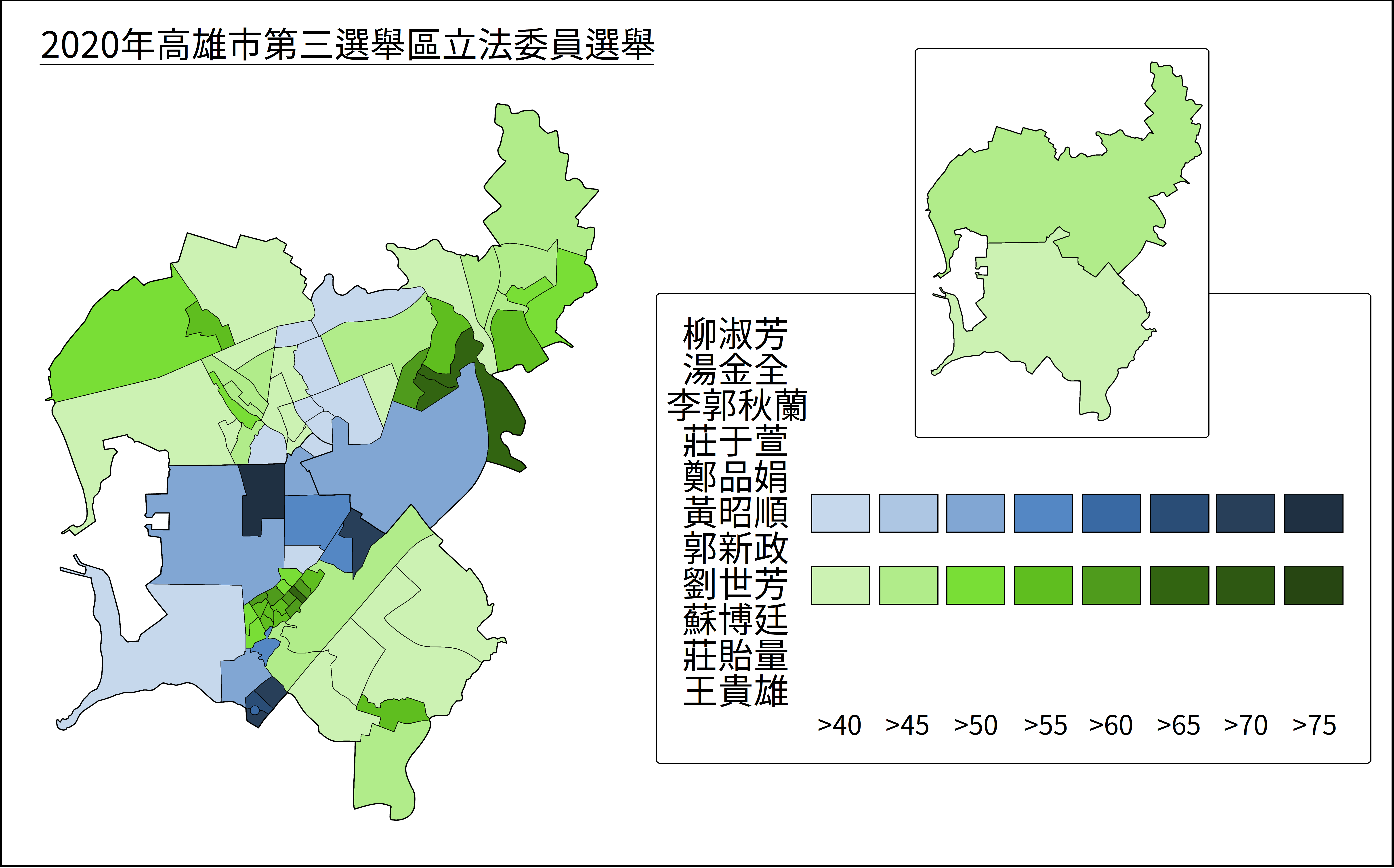 2020年高雄市第三選舉區立法委員選舉得票